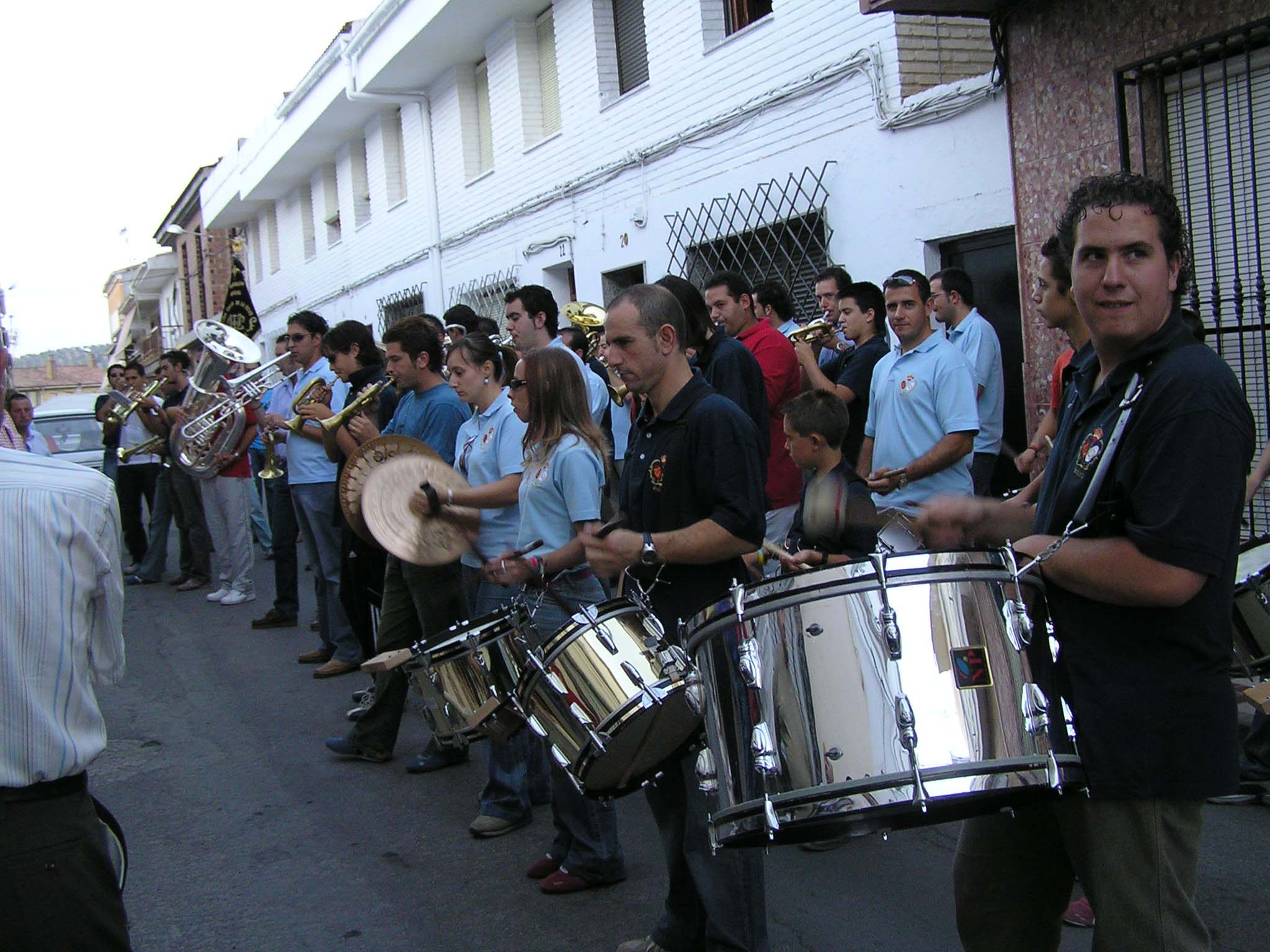 Banda musical tocando tambores, platillos y otros instrumentos.